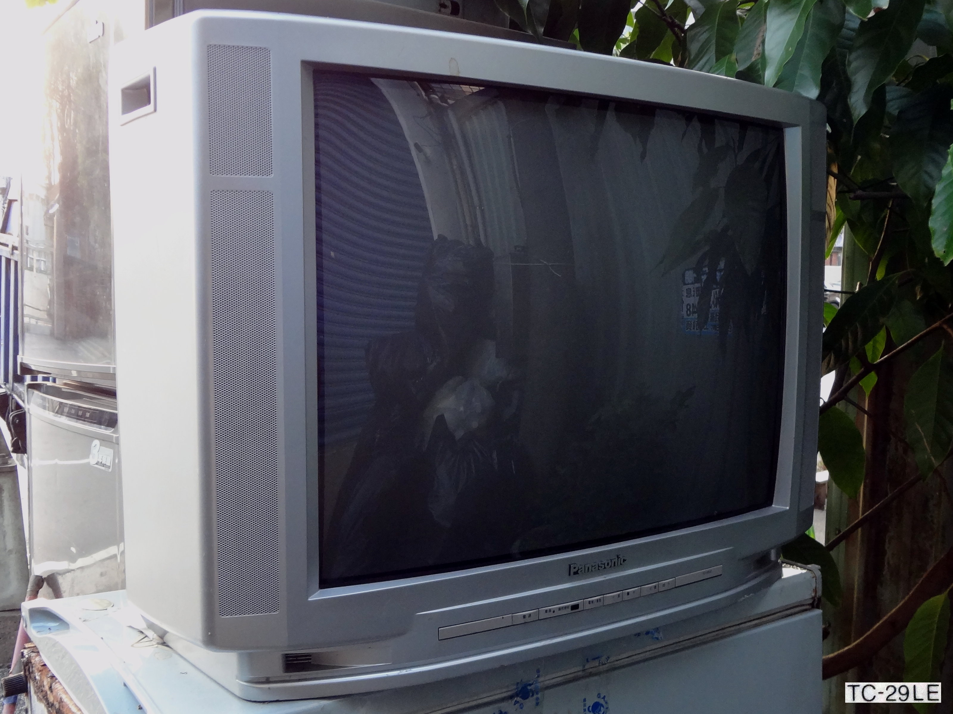 台灣松下電器Panasonic彩色電視機TC-29LE。